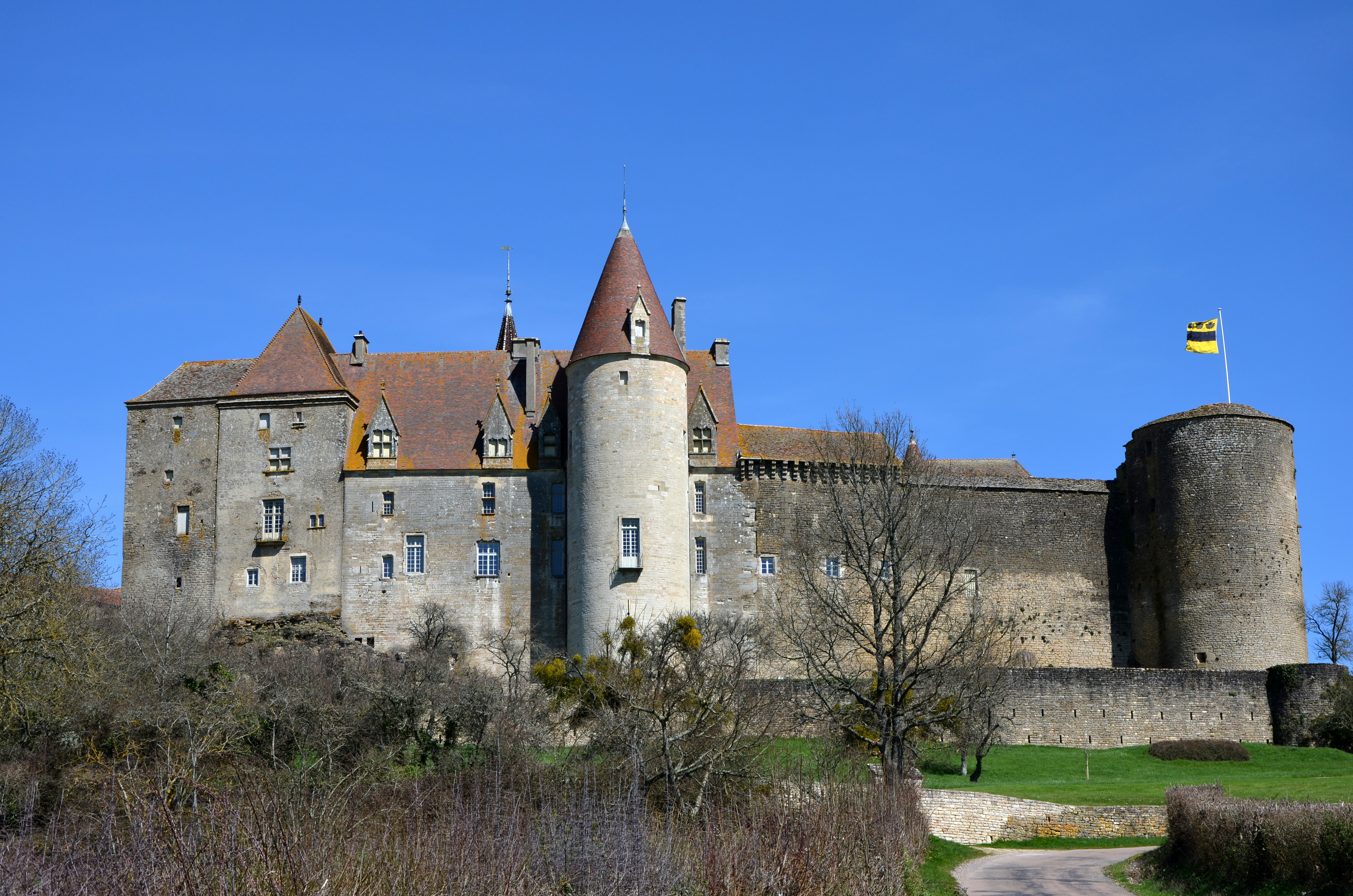 Château de Chateauneuf, Côte d'Or, Bourgogne, France